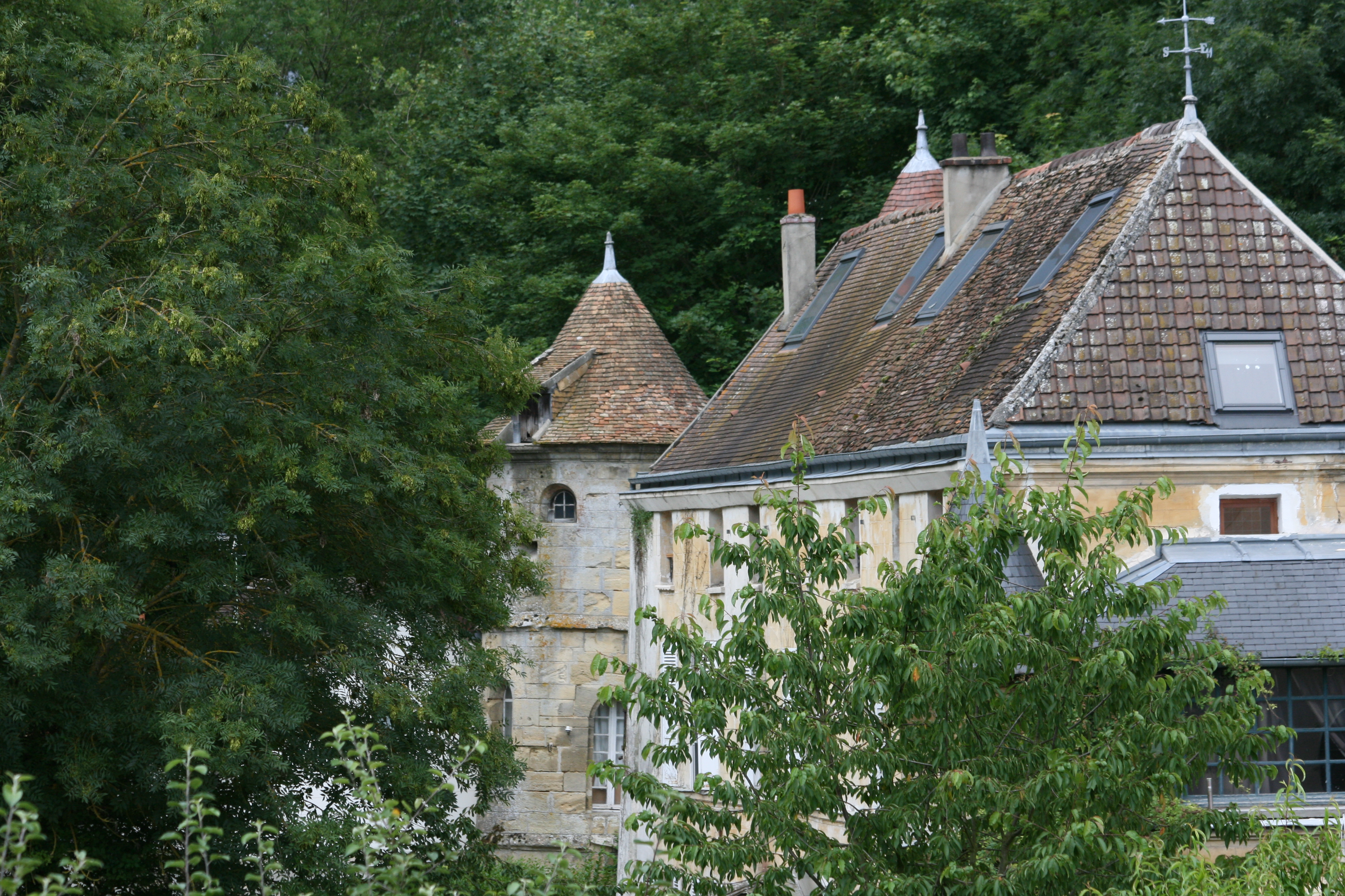 Manoir de Réal, façade, Boissy l'Aillerie, Val d'Oise